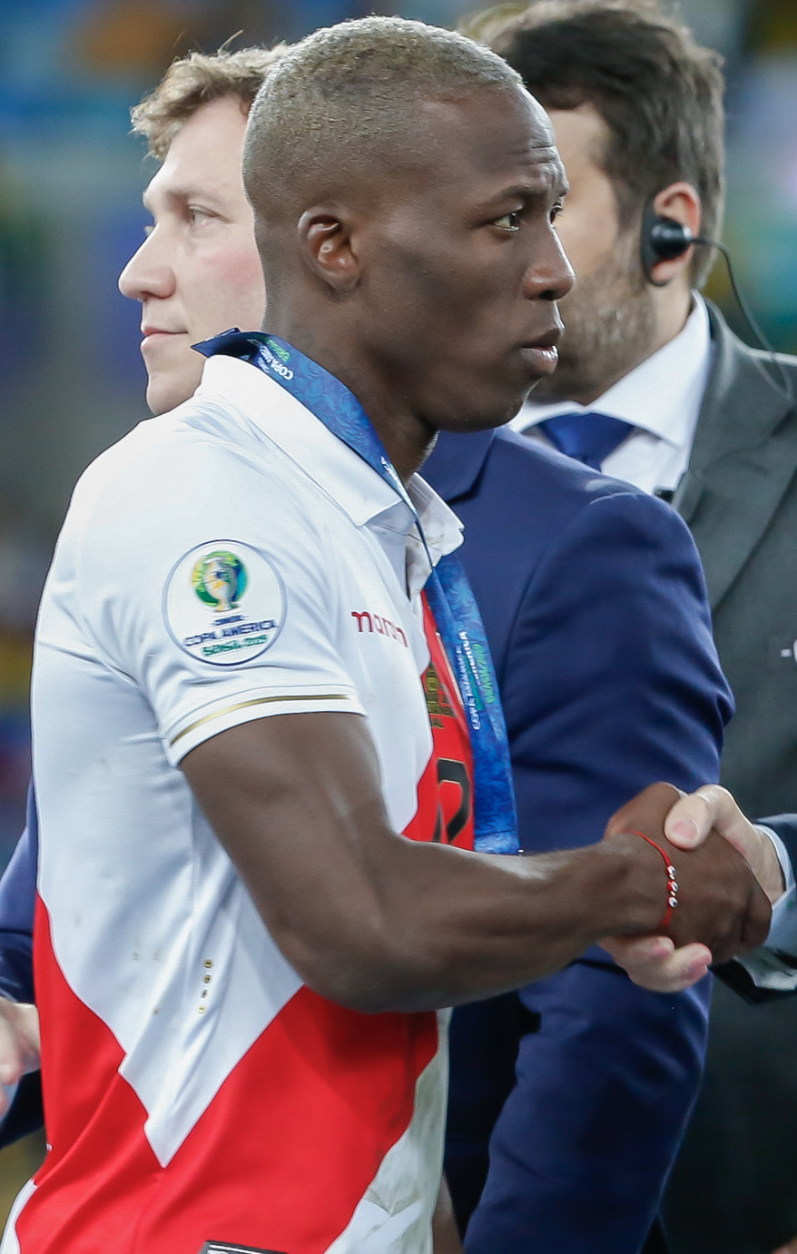 (Rio de Janeiro - RJ, 07/07/2019) Presidente da República, Jair Bolsonaro, e o Presidente da Confederação Sul-Americana de Futebol (CONMEBOL), Alejandro Domínguez, durante entrega da premiação da Copa América 2019. Foto: Carolina Antunes/PR